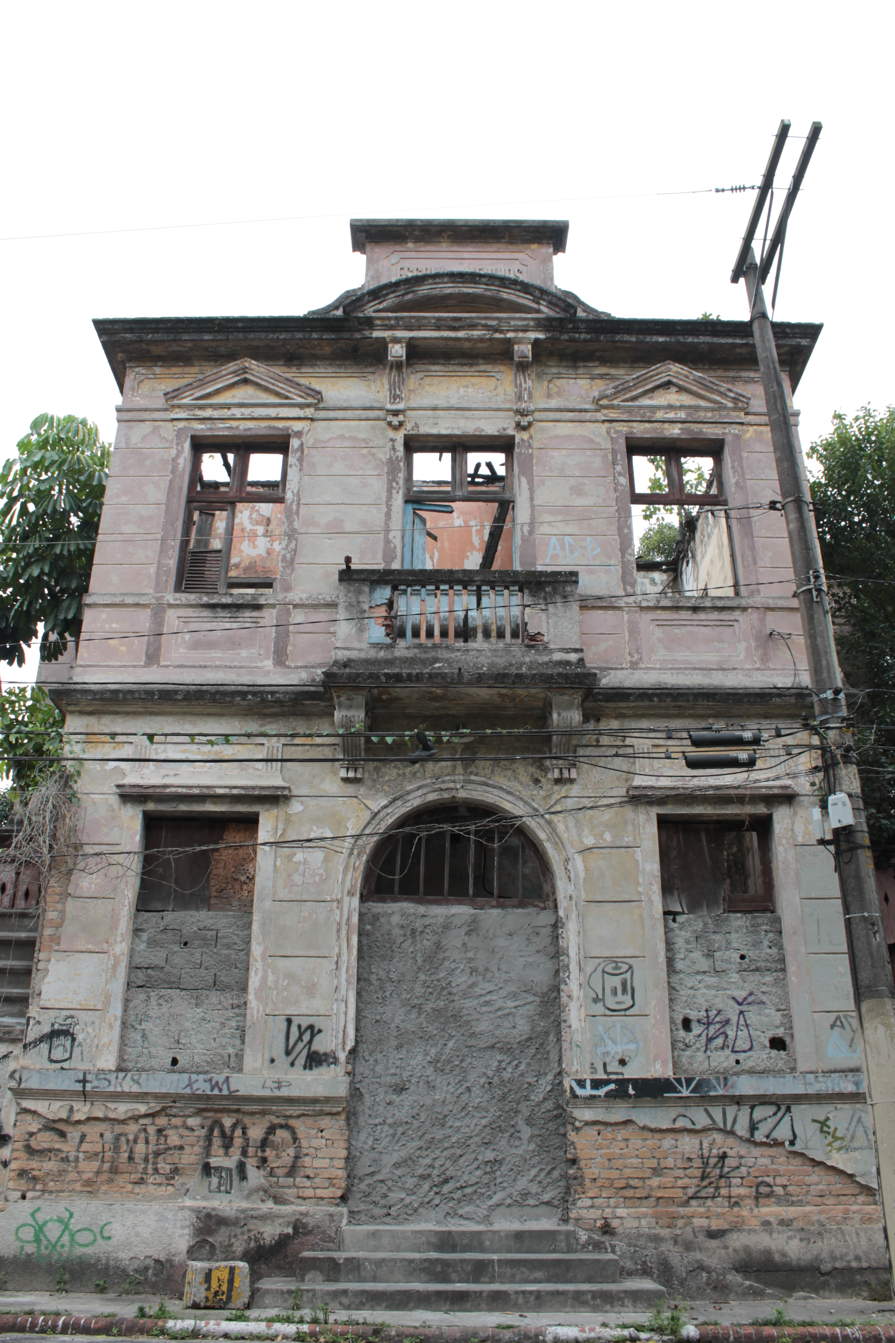 Vista frontal da Escola de Meninos